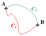 Différents chemins d'intégration Auteur : Bertrand Coconnier, réalisé avec Word + Paint. Licence GFDL Bertrand Coconnier